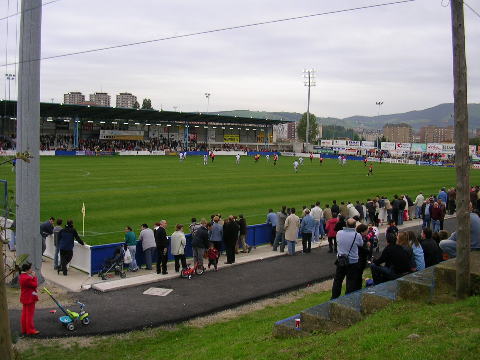 Campos del Malecón en 2004, antes de su remodelación.